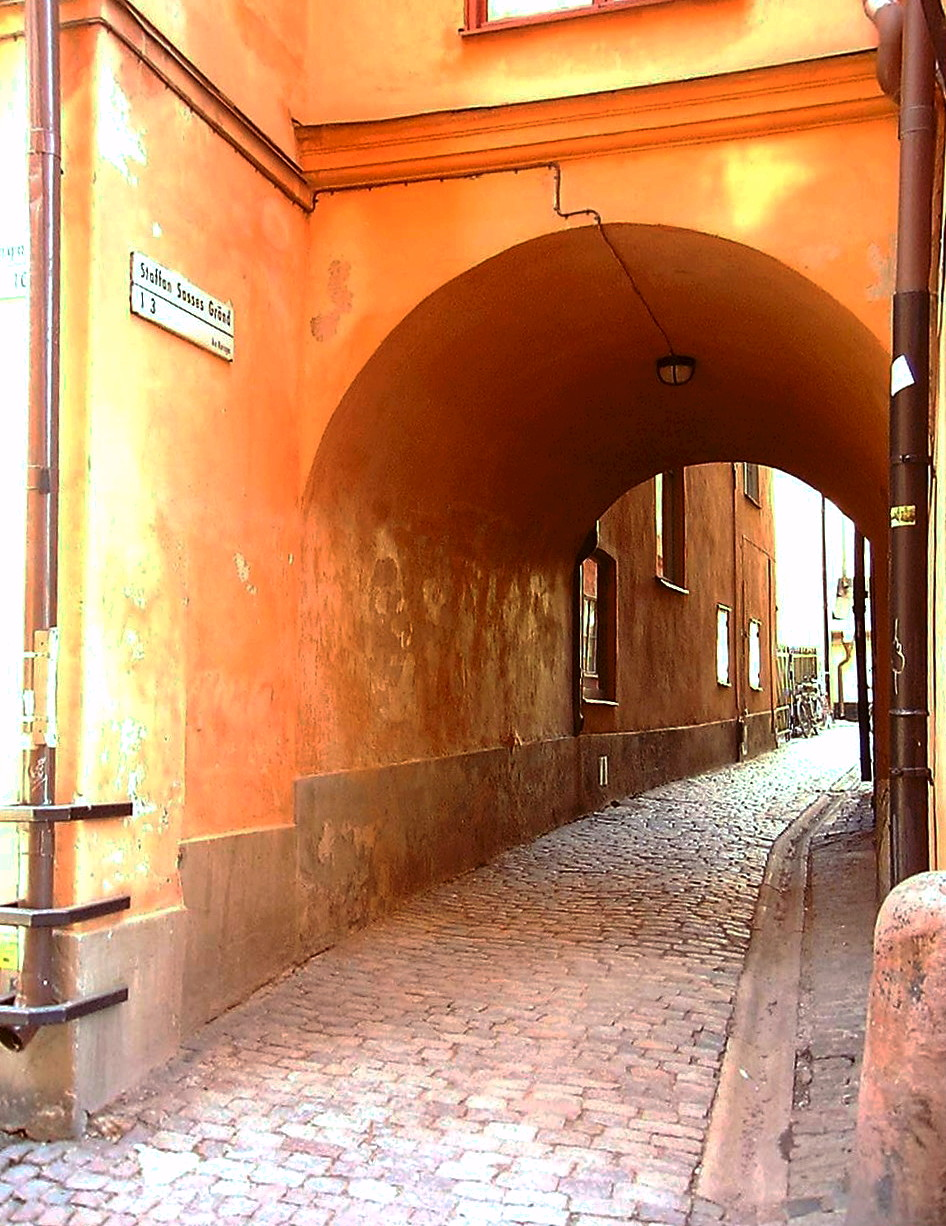 Vault at Staffan Sasses Gränd, Gamla stan, Stockholm.